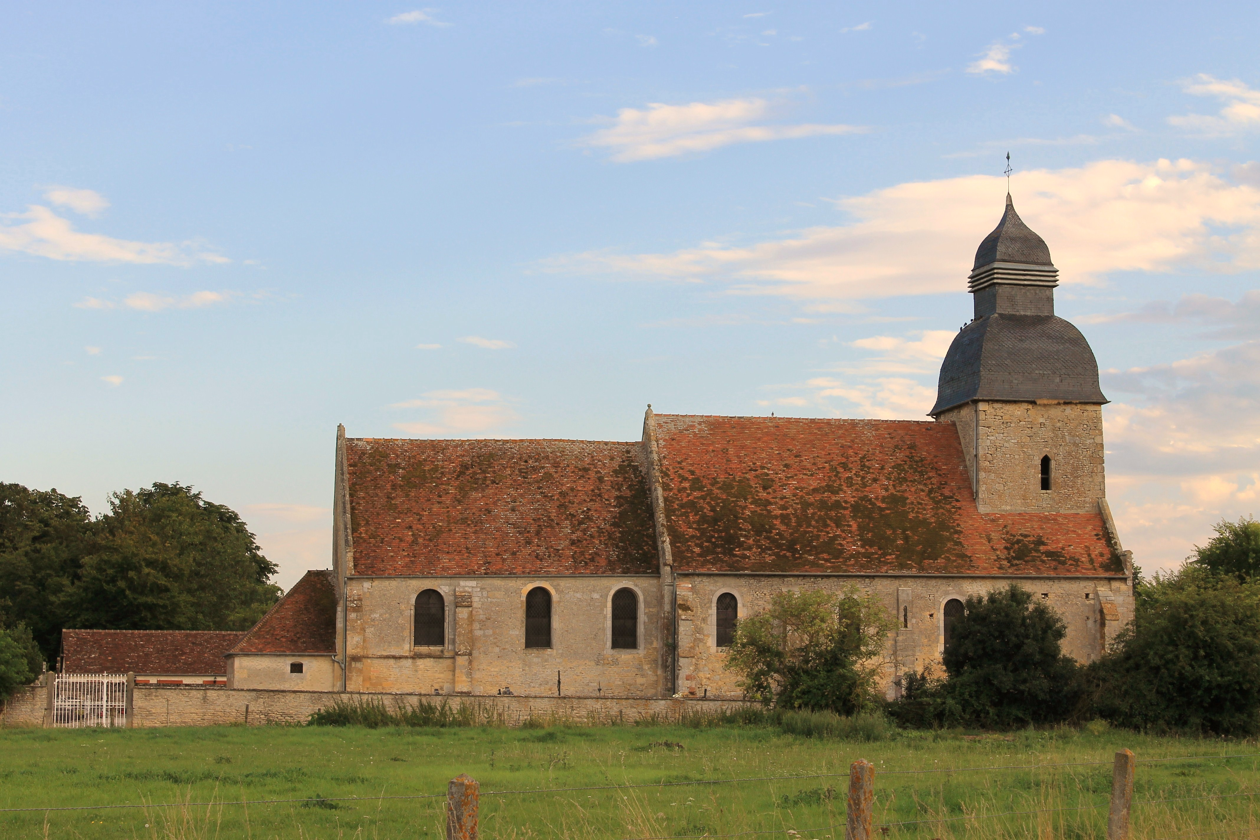 Église Saint-Pierre d'Écajeul à Le Mesnil-Mauger (Calvados)